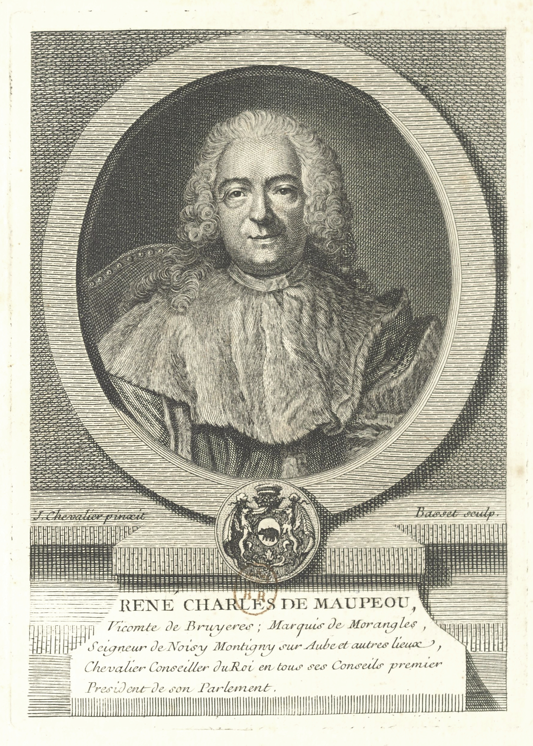 René Charles de Maupeou (1688 - 1775), magistrat, Premier Président du Parlement de Paris, Chancelier de France, Garde des Sceaux sous Louis XV.